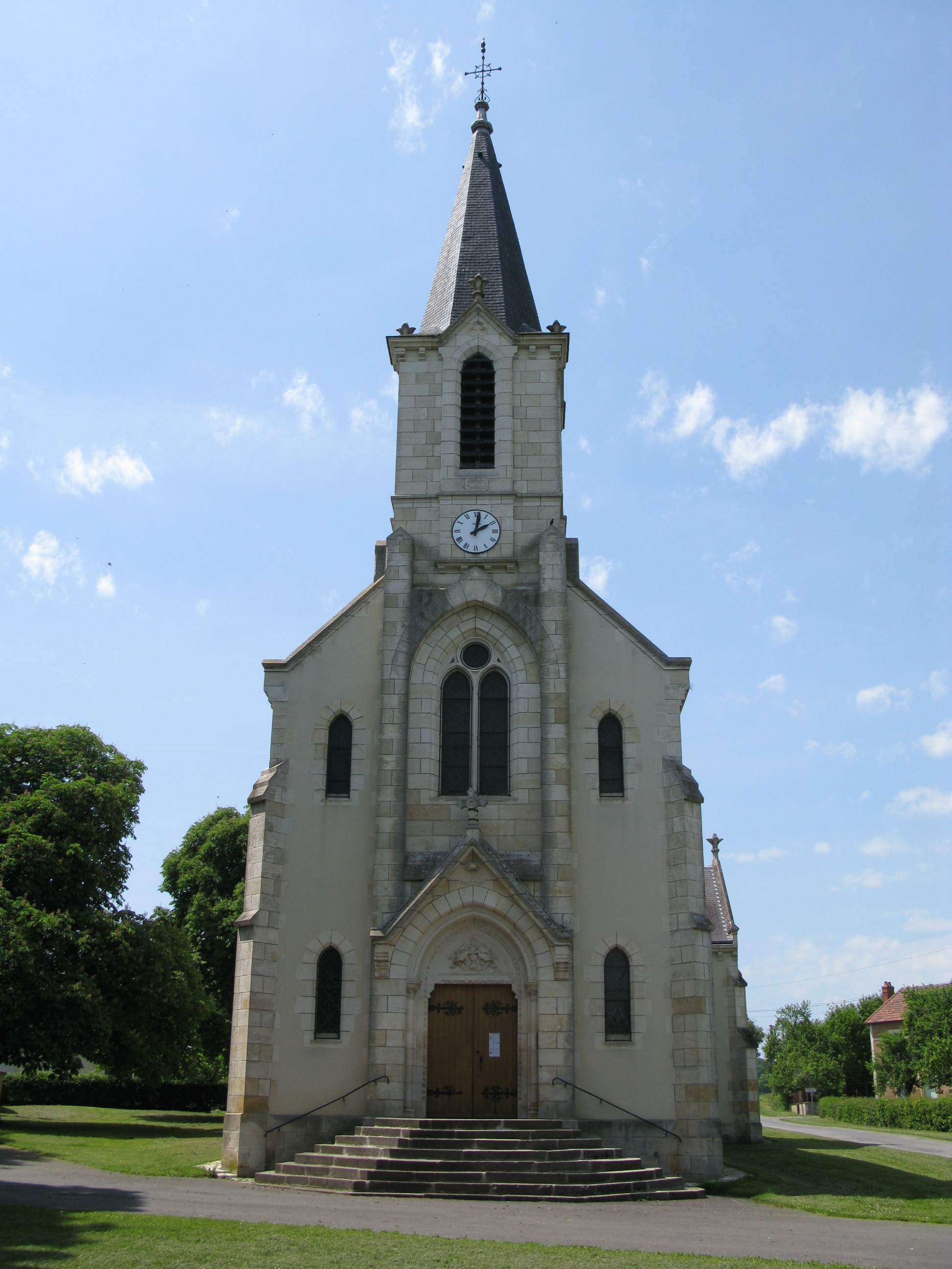 Sidiailles, l'église